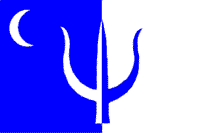 Drapeau de la principauté de Bastar Contents 1 Source 2 Statut 3 Licensing 4 Original upload log Source Nataraja Statut Nataraja Catégorie:Drapeau de principauté des Indes